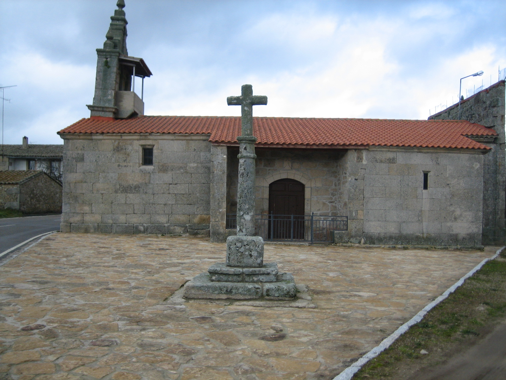 Hermita de Santa Bárbara y Santa Catalina, en Tudera –Zamora–. Portada meridional y crucero de entrada al pueblo